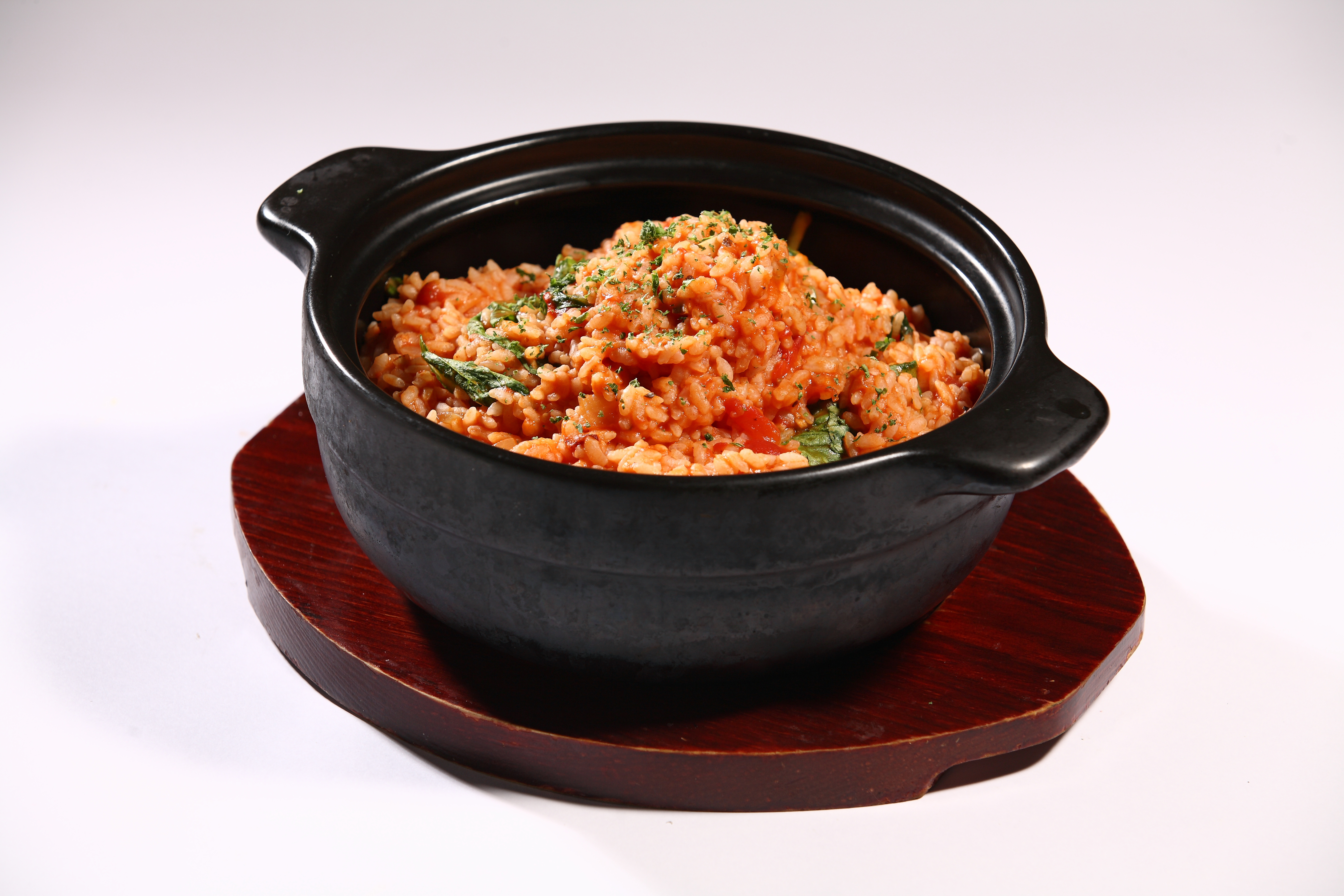 주식회사 엔아이에프앤씨 닐리 파스타 음식 사진(닐리 파스타 과천점)